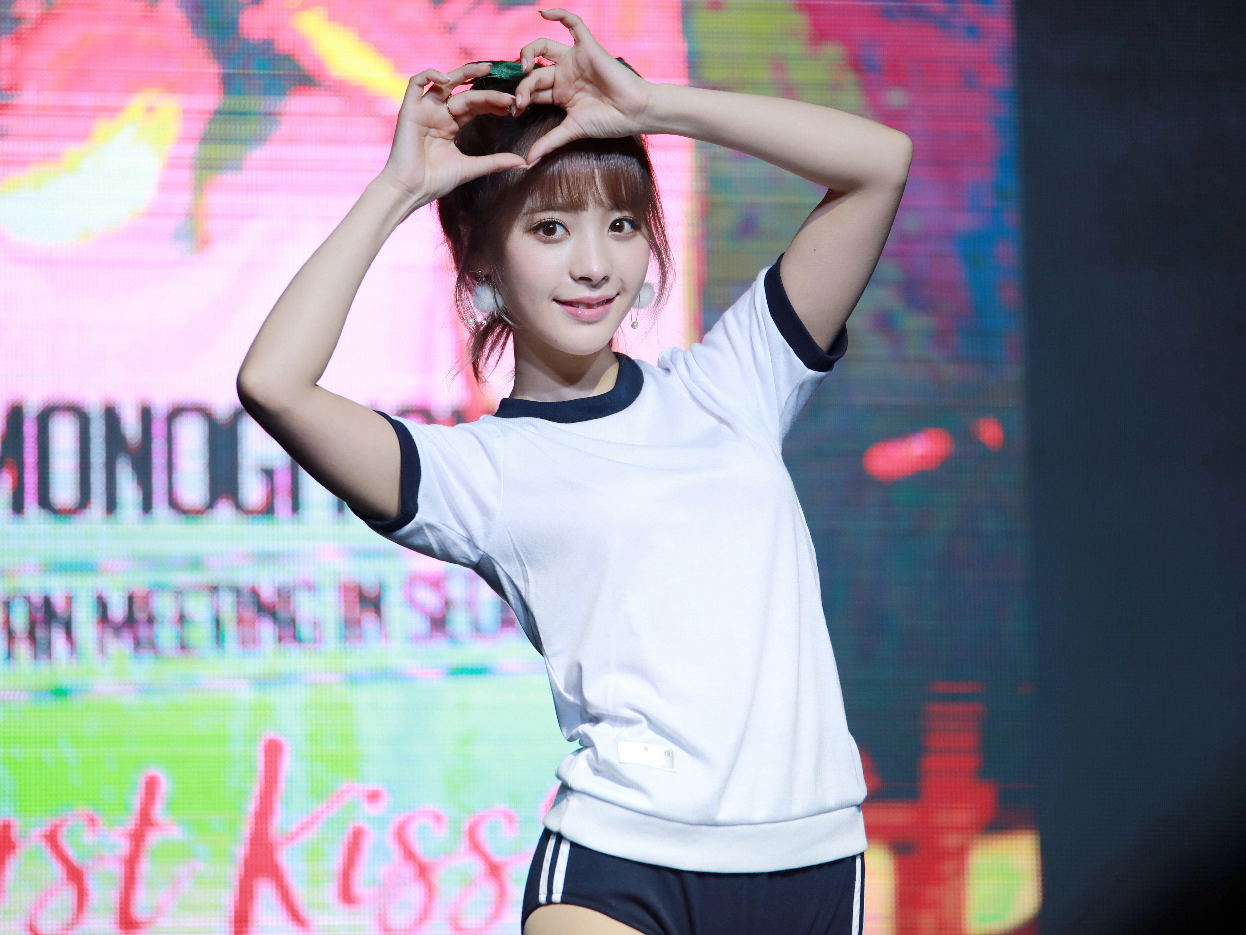 171209 桃乃木かな(모모노기 카나) 2017 FAN MEETING in SEOUL (First Kiss)1部 写真 ♡桃乃木かな♡